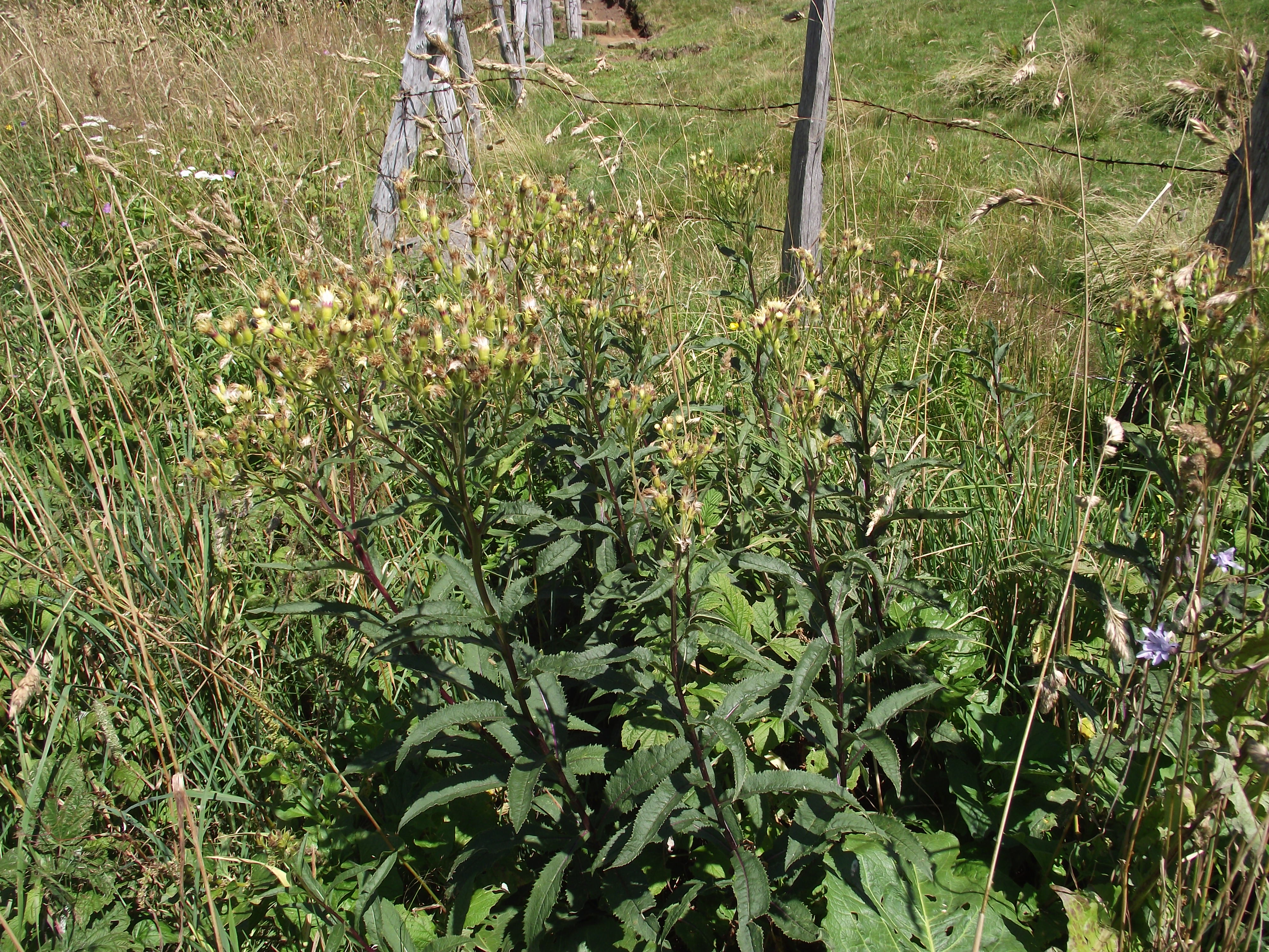 Seneçon cacaliaster dans le massif du Sancy (Auvergne, France)